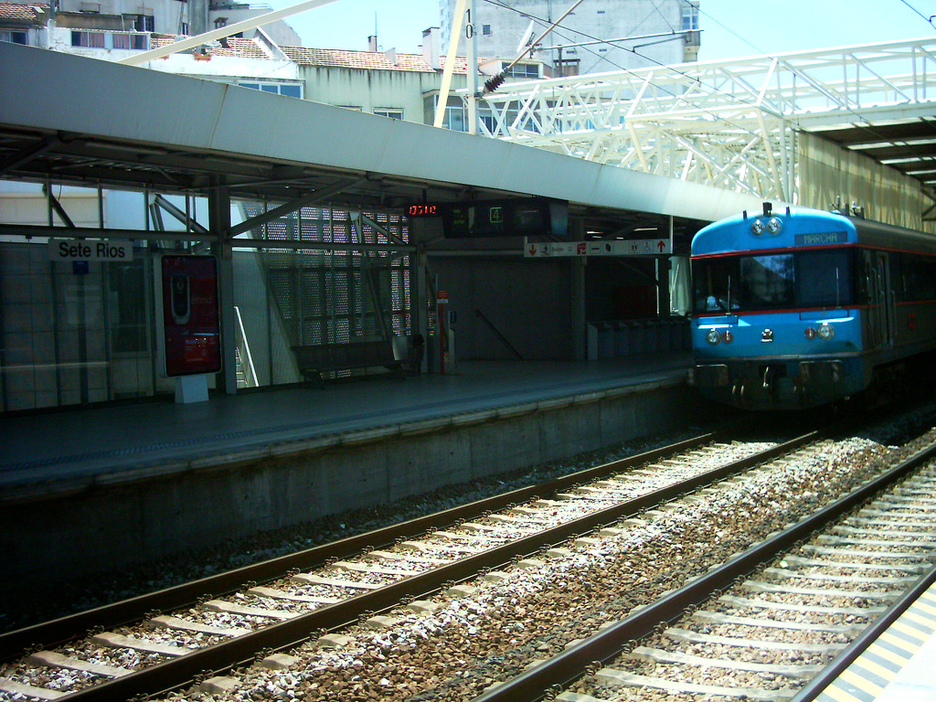 Automotora da Linha do Oeste em Sete Rios (Lisboa): "Marcha"